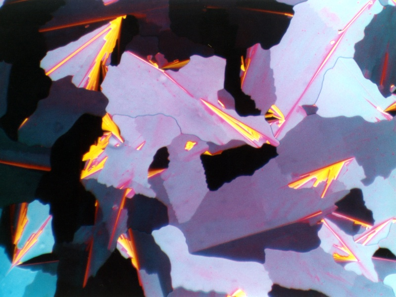 Polarisationsmikroskopische Aufnahme einer rechtwinklige kolumnare Phase von bent-core („bananenförmigen“) Mesogenen, sogenannte B1-Phase; Mosaiktextur.